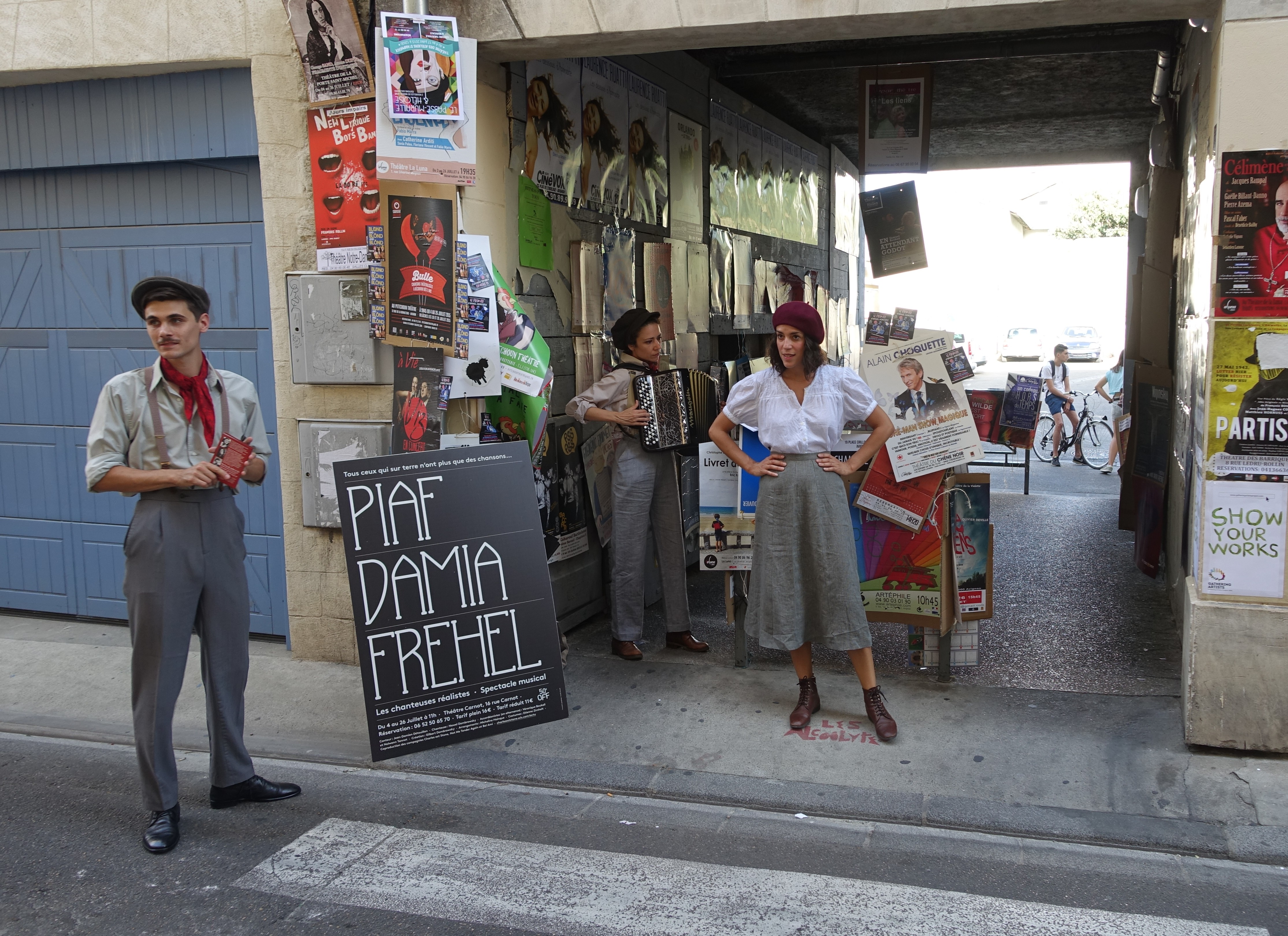 Spectacle "Piaf, Damia, Frehel" - Jean-Damien Detouillon, Véronique Boukali, Nawel Dombrowsky - Juillet 2015